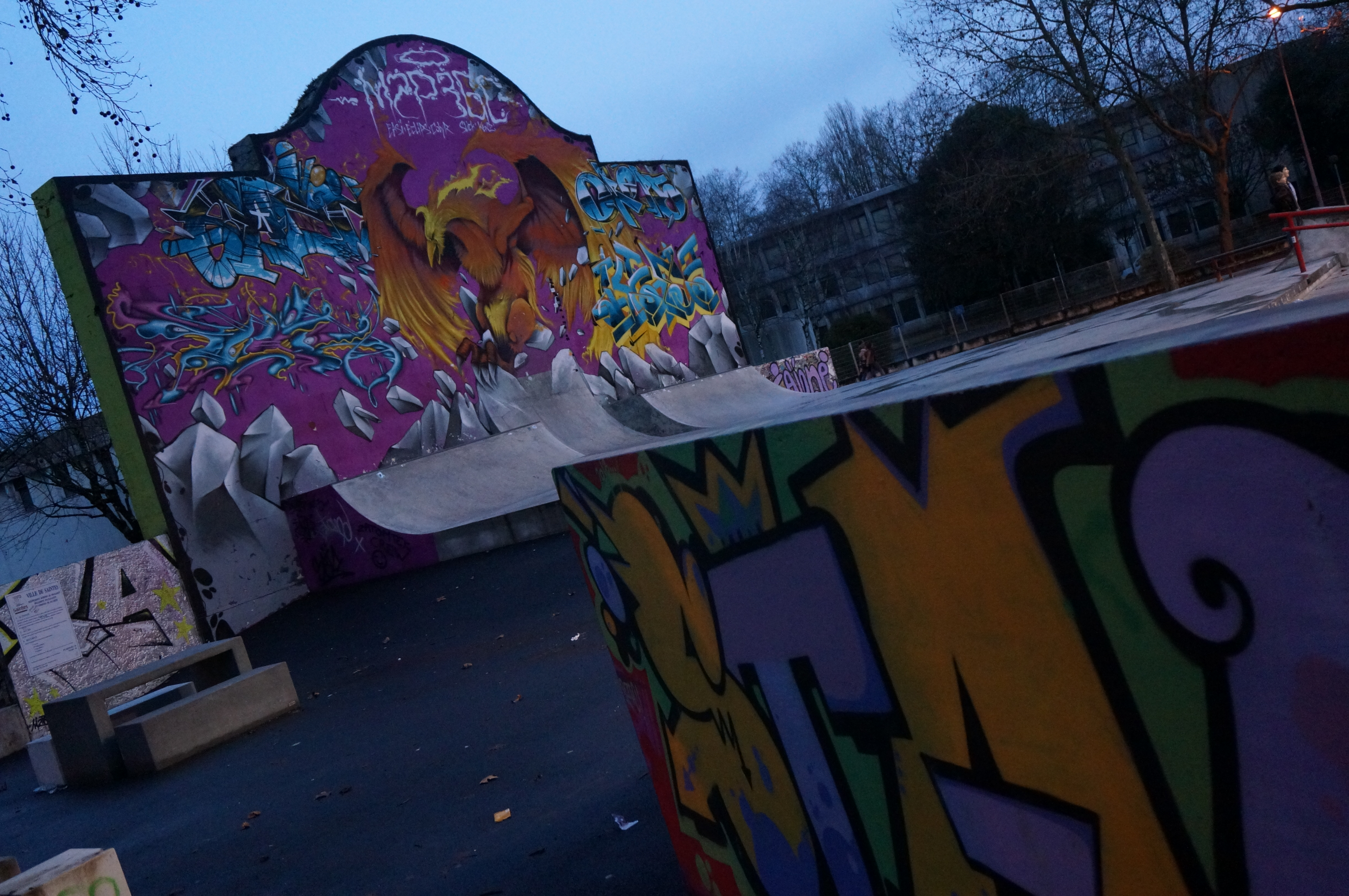 Palais de Justice de Saintes.